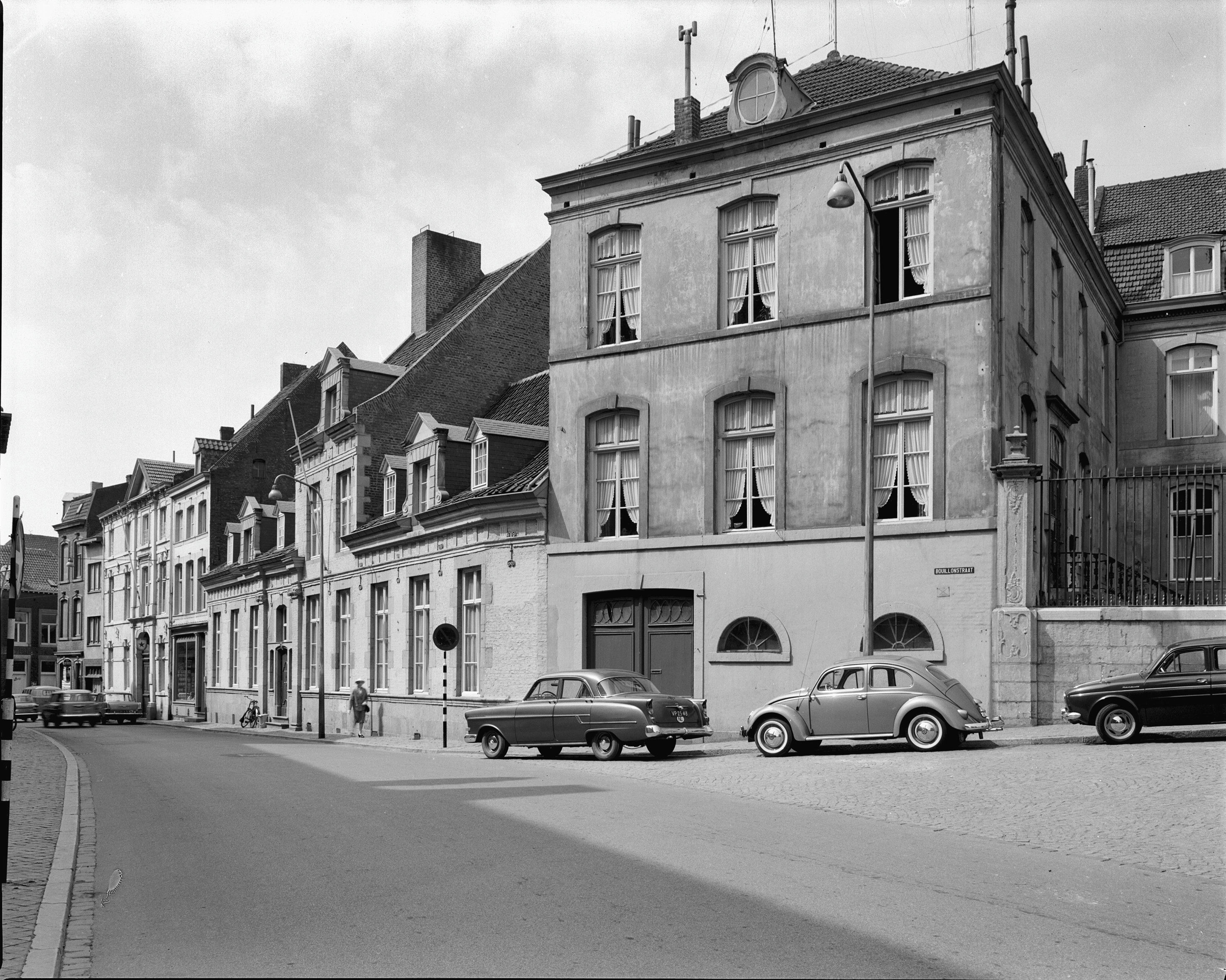 6 en hoger